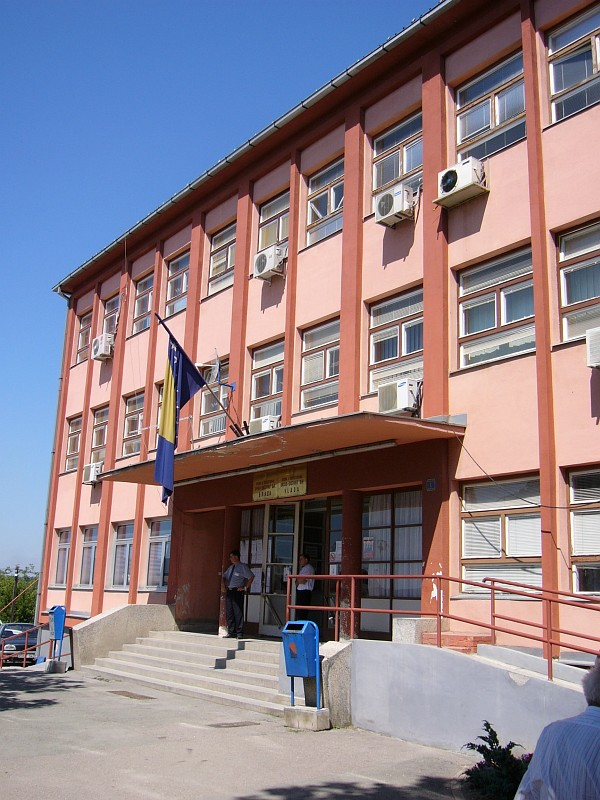 Rathaus Brcko